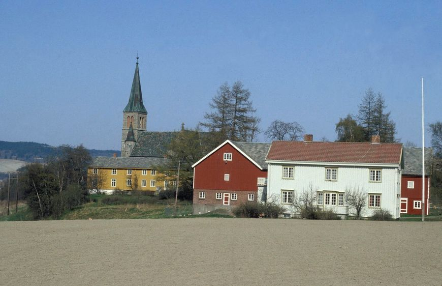 Melhus prestegård. Ukjent fotograf, bilde fra Riksantikvaren